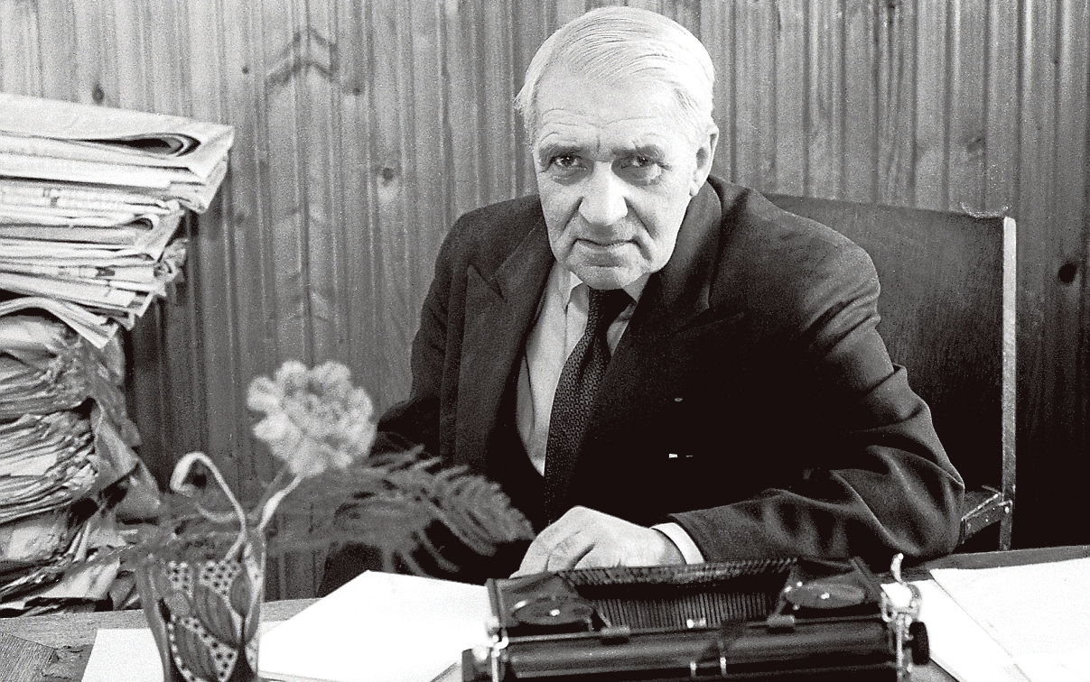 Gunnar Björling var den uthållige modernisten som med blid envishet utlade sin lära och sin dikt också i hundratals brev och i långa samtal i sin legendariska bostad i en f.d. bastu i Brunnsparken i Helsingfors.